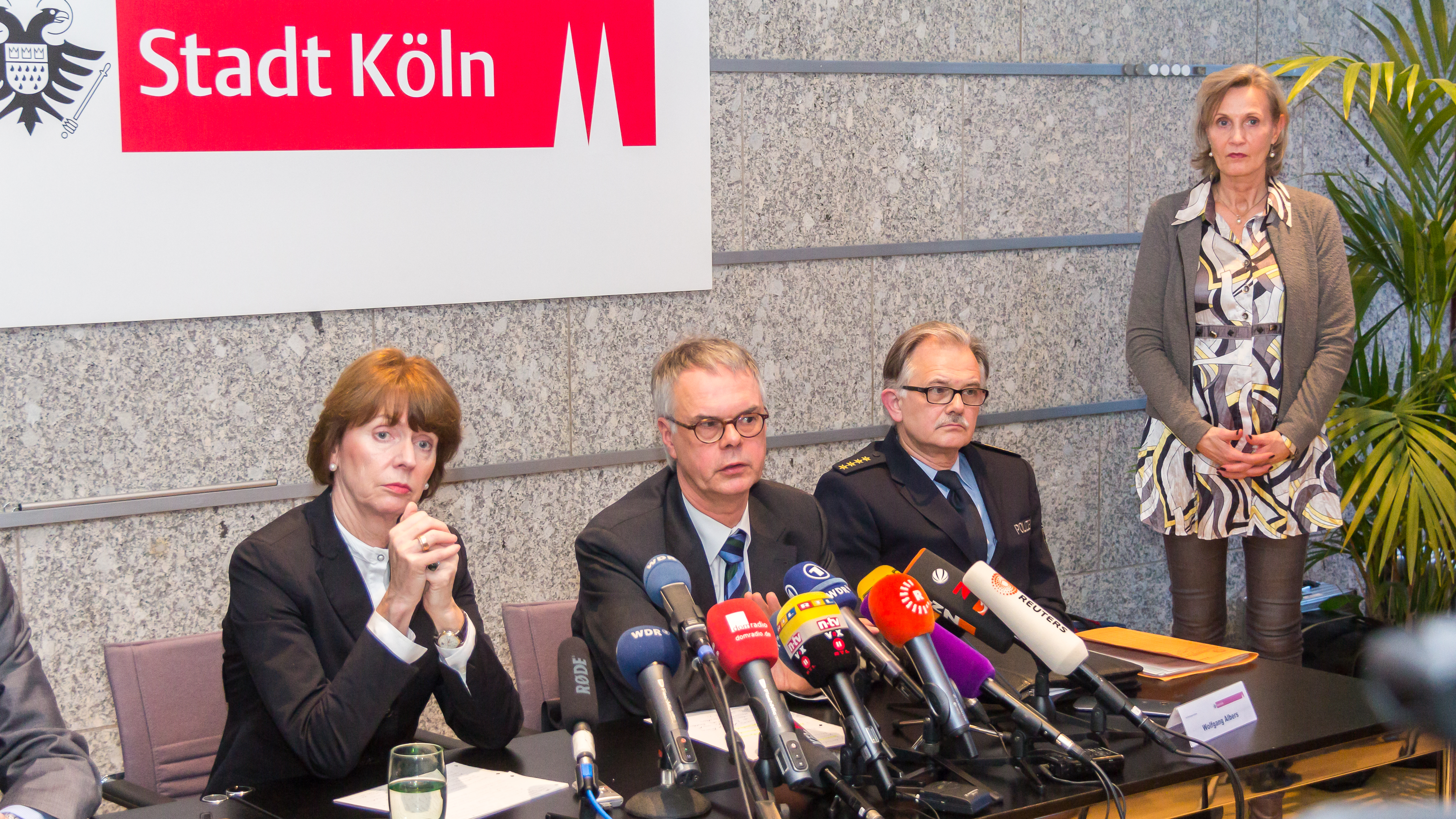 Pressekonferenz im Rathaus Köln zu den Vorgängen in der Silversternacht 2015/16 Foto: Oberbürgermeisterin Henriette Reker (links), Polizeipräsident Wolfgang Albers (Mitte)